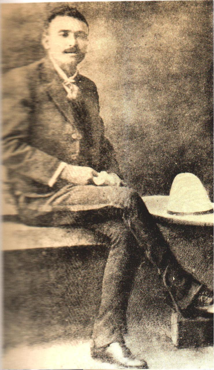 Fotografía del General Benigno Abundez